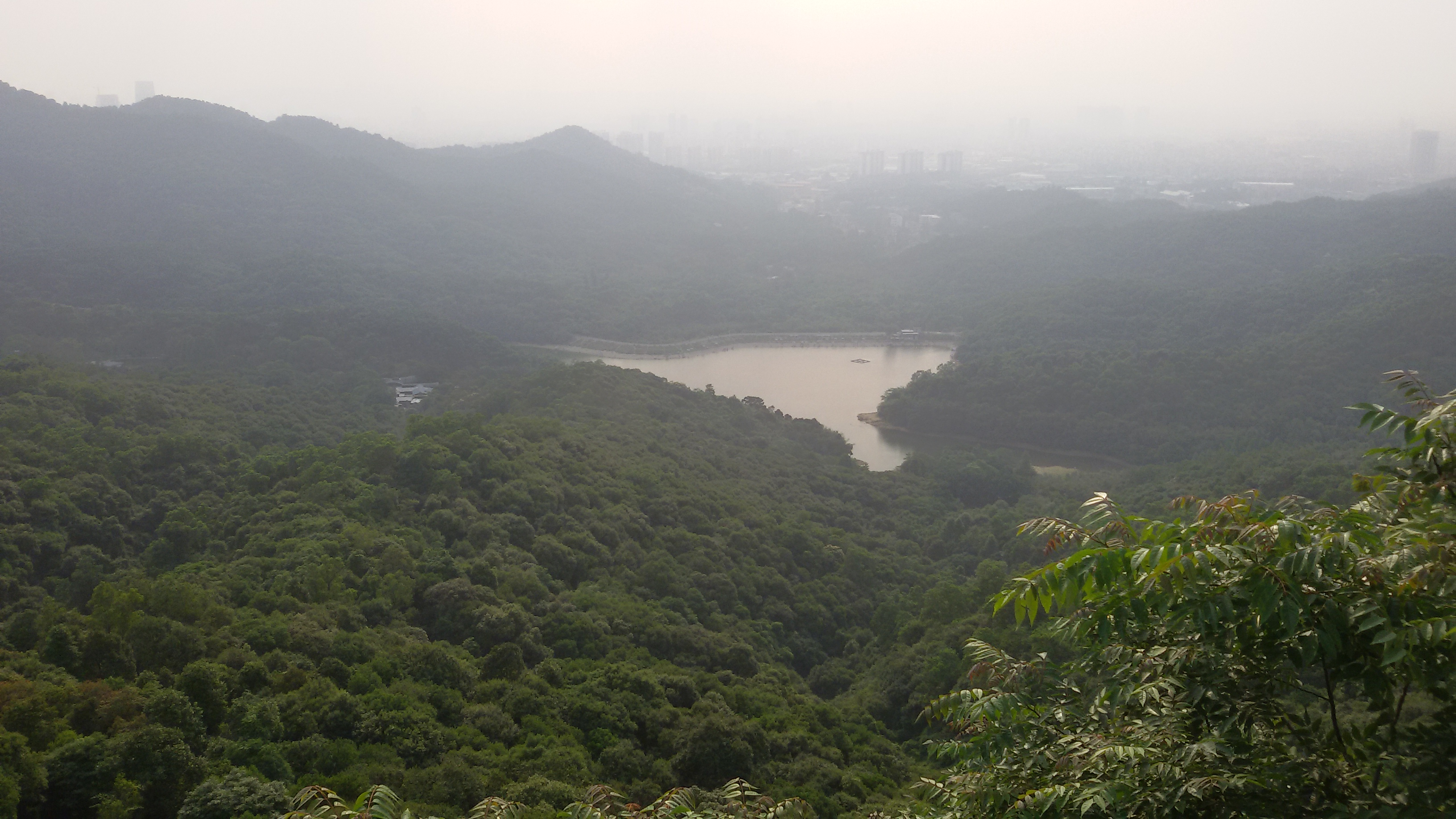 粵語: 黃婆洞水庫